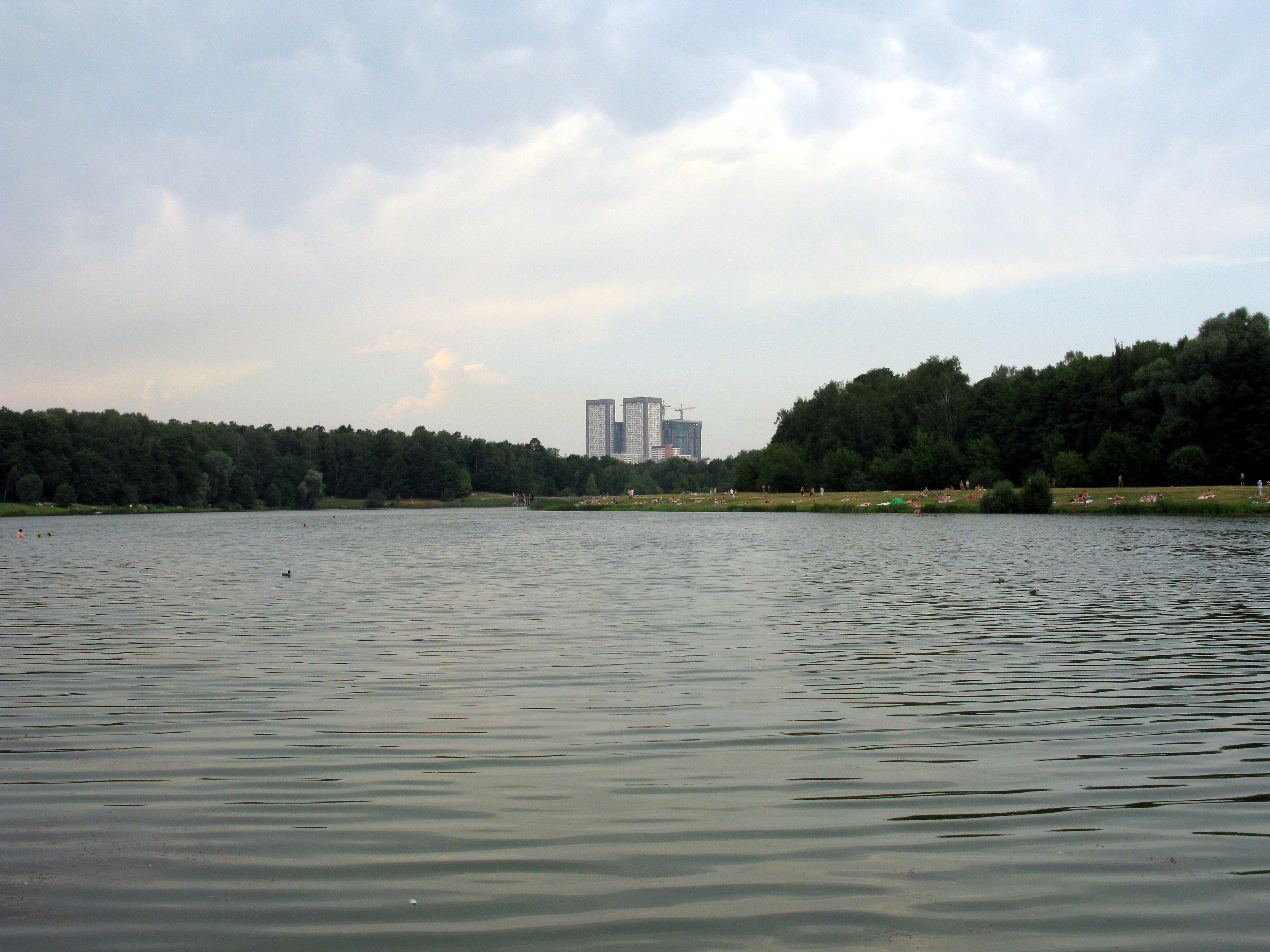 Лебедянский пруд. Измайловский парк, Москва.